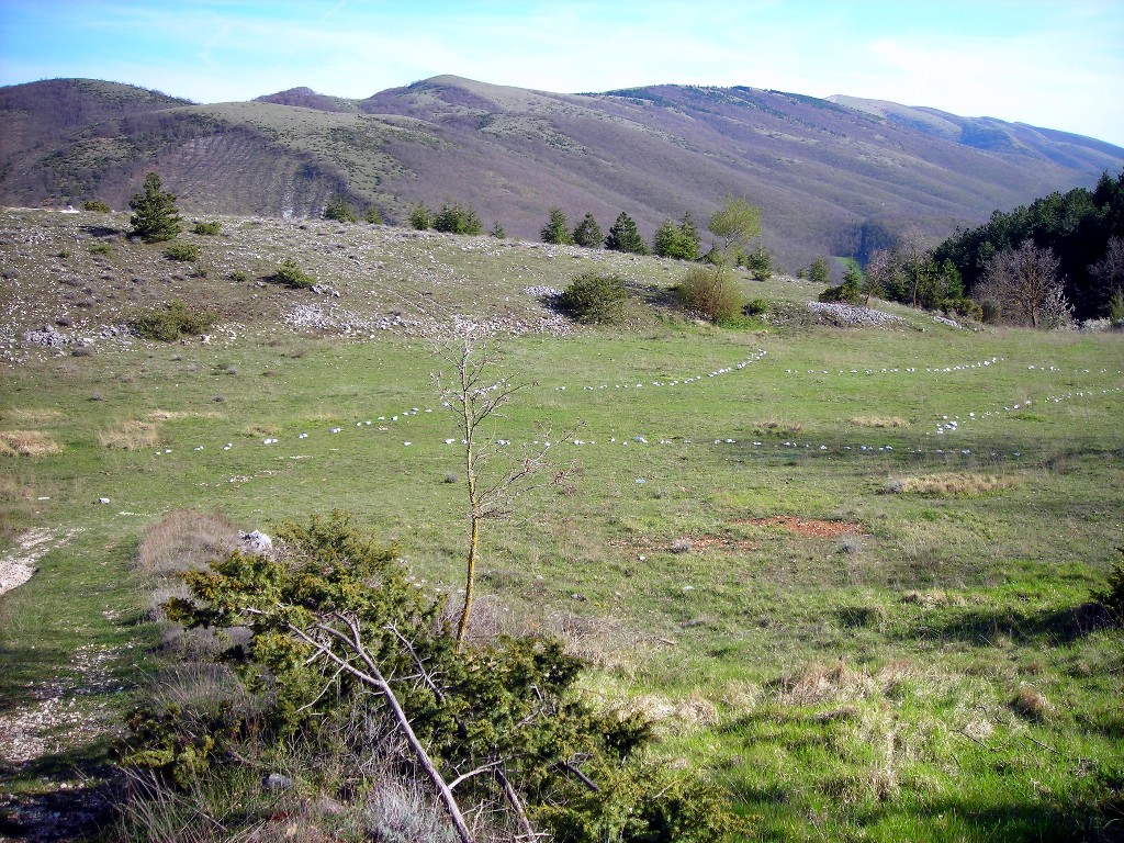 strange artistic signs near Cancelli, Foligno, Perugia, Umbria, Italy